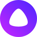 Логотип персонального голосового помощника Алиса